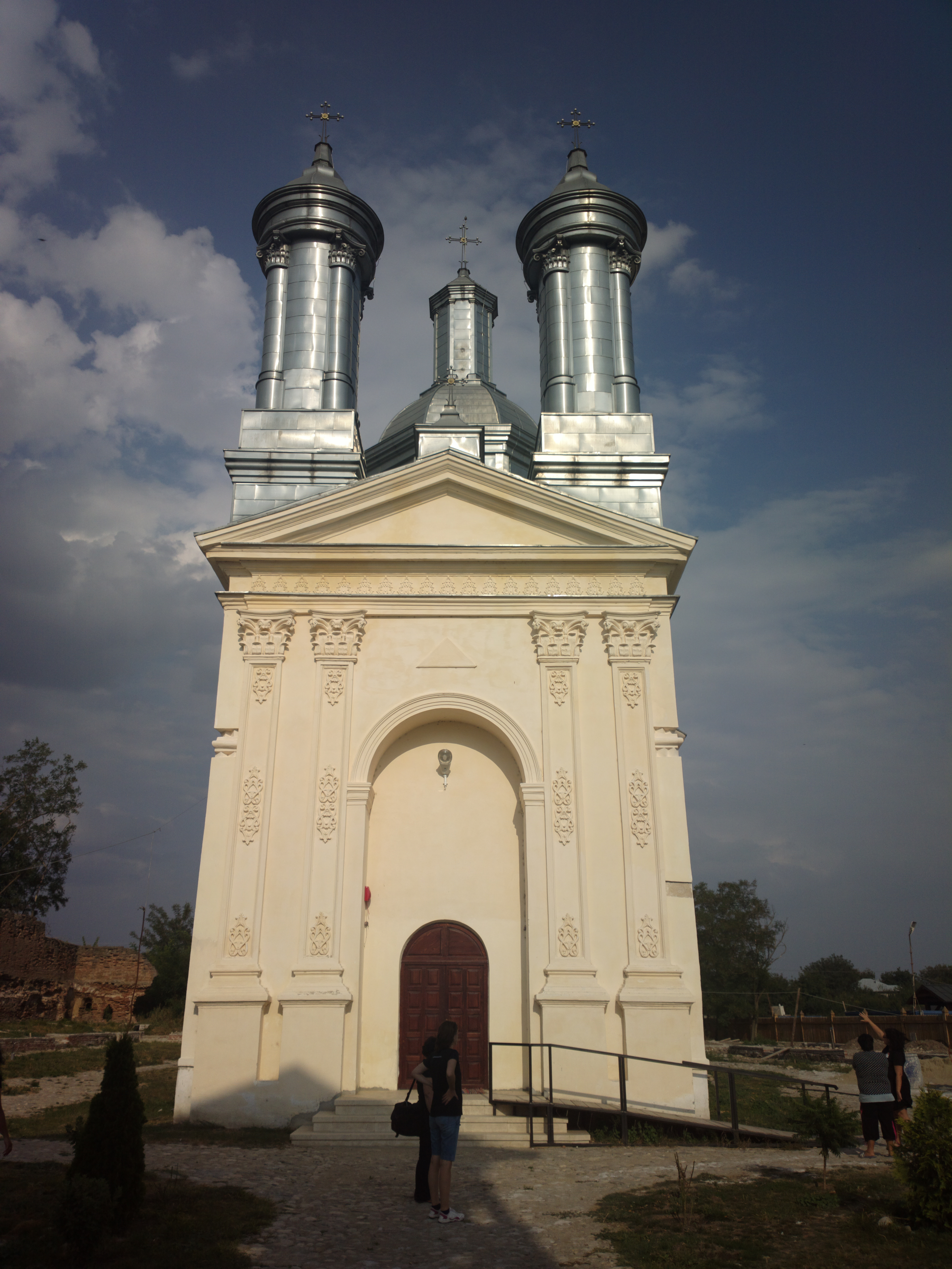 Biserica „Sf. Mihail și Gavril” 01